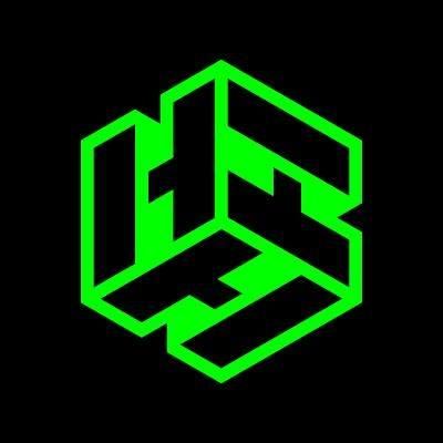 Heureka logo